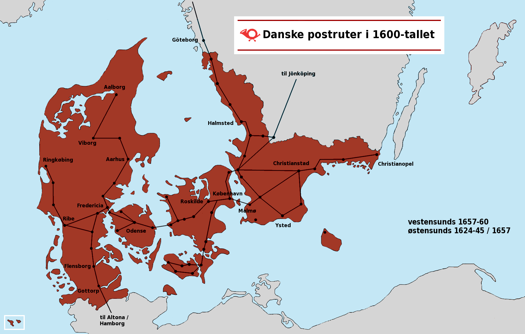 Postruter i 1600-tallet, Kilde: E. Bohn: Postvæsenet under krigene. I: Jørgen Bergsøe (Hrsg.): Det kongelige danske postvæsen. København 1924, sider 224-227